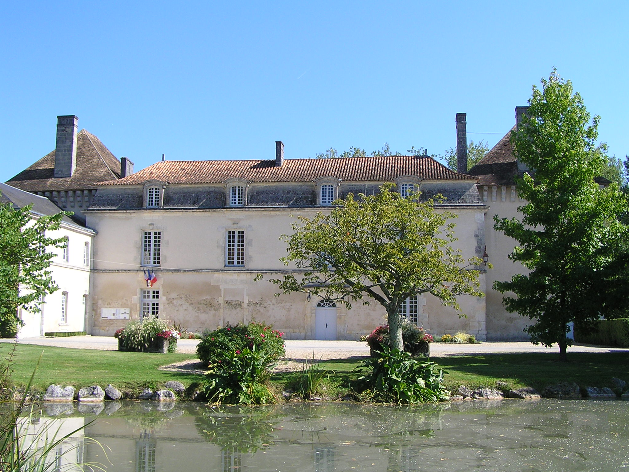 mairie ( et château) de Lignières-Sonneville